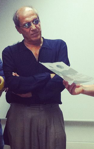 Una lezione speciale al Politecnico di Milano